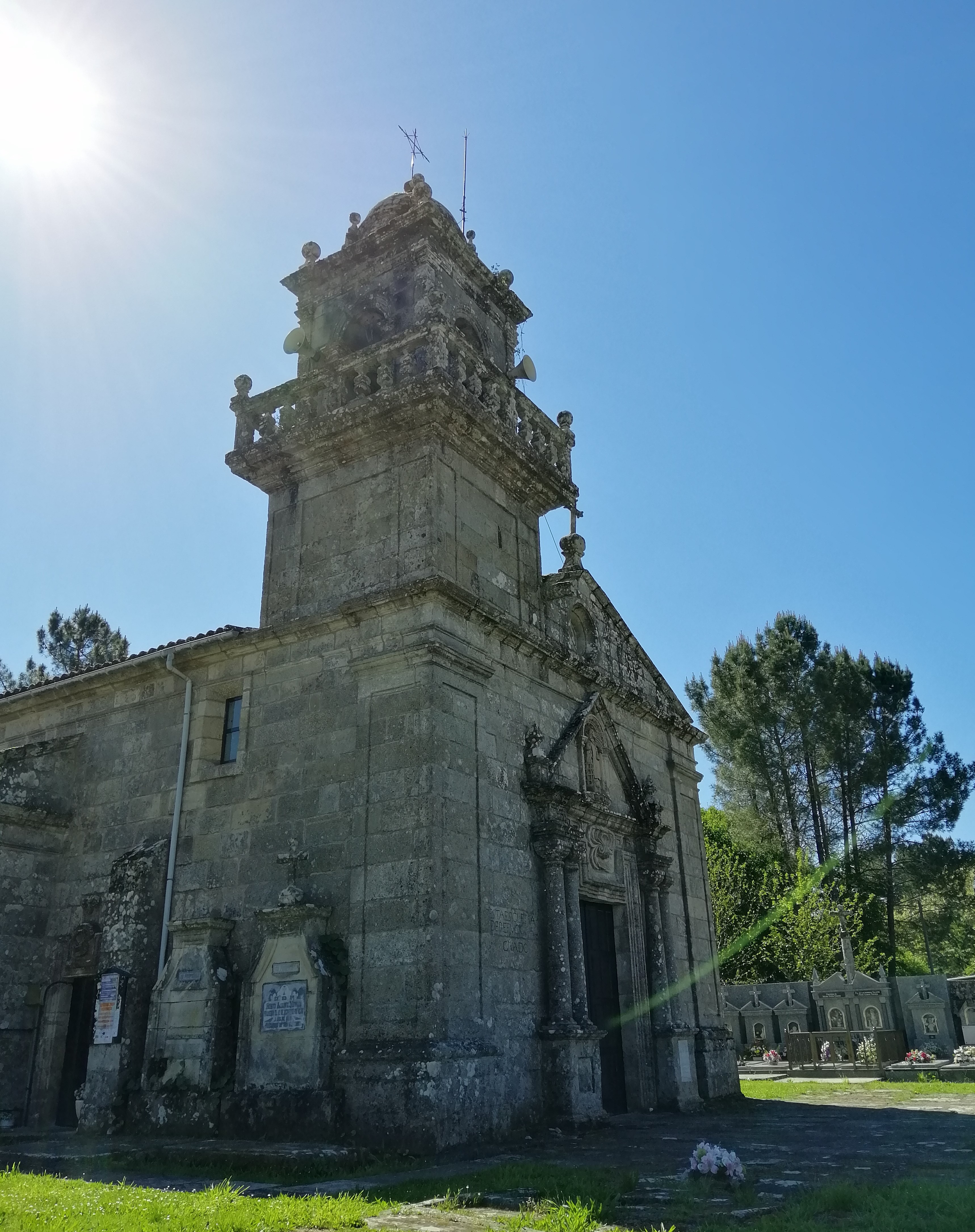 Igrexa parroquial de Fustáns, en honra a San Lourenzo.